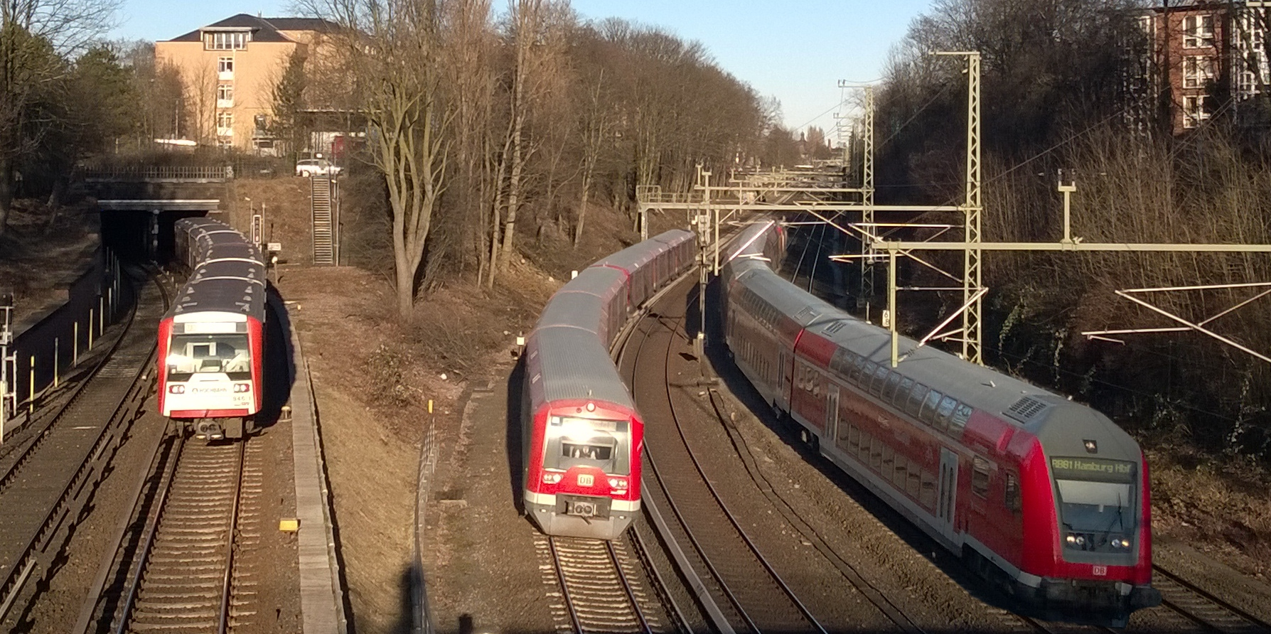 Nahverkehrszüge in Hamburg an der Wallstraßenbrücke (Fotomontage)